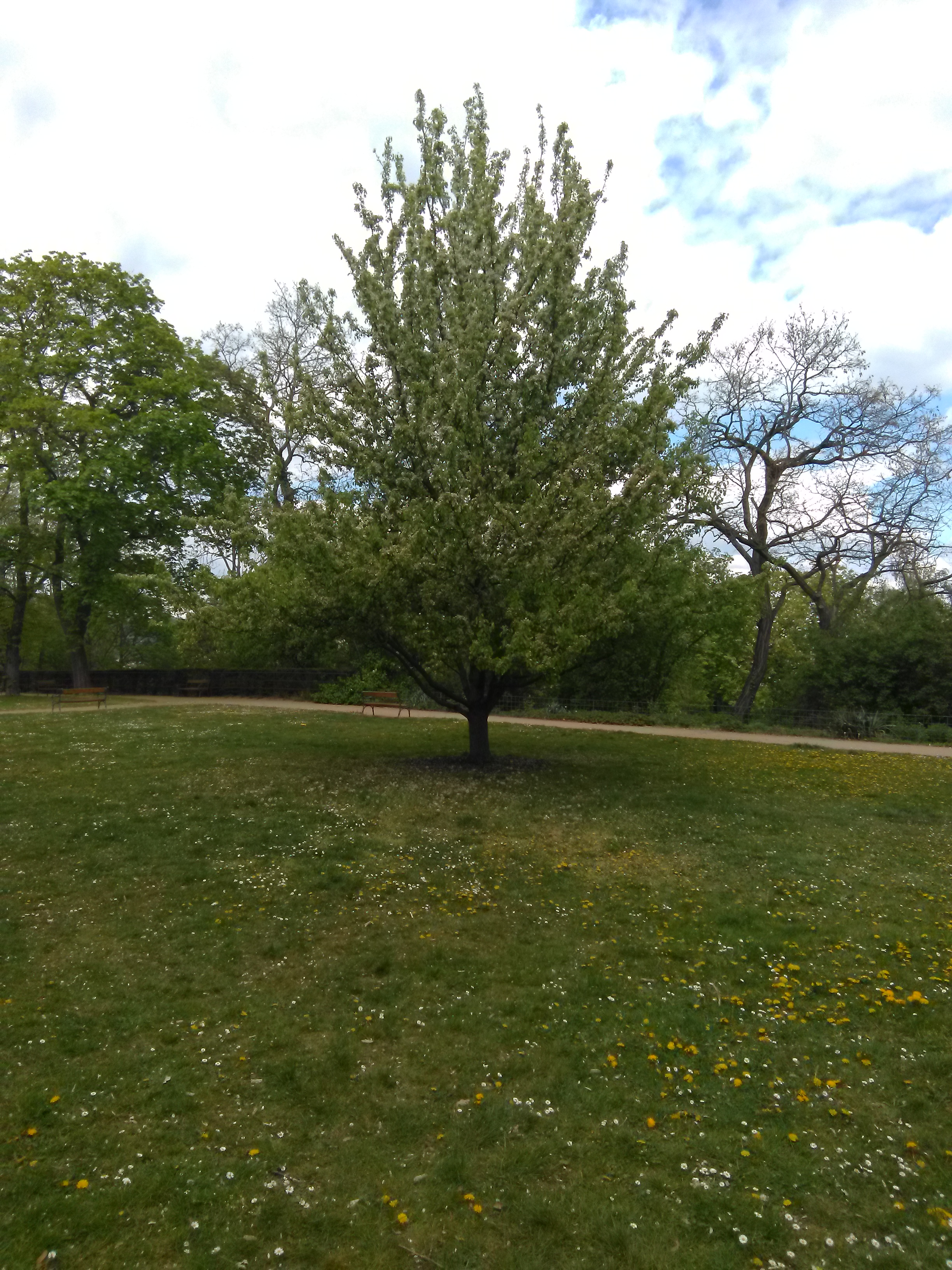 Hrušeň obecná (Pyrus communis L.). Praha 2 - Vyšehrad, Karlachovy sady. Vysazena 19. října 2000. Významný strom, evidenční číslo MHMP: 32, v databázi od roku 2014.